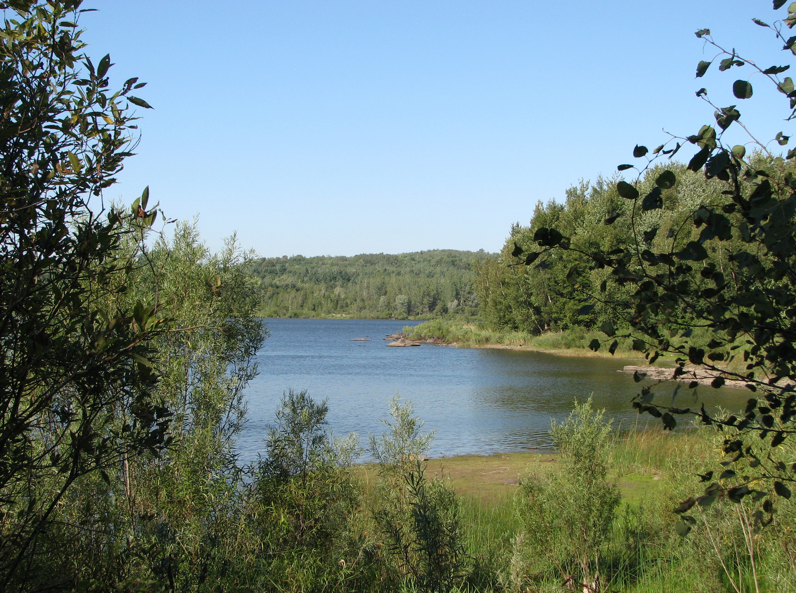 Réservoir Choinière, dans le parc de la Yamaska (Québec)